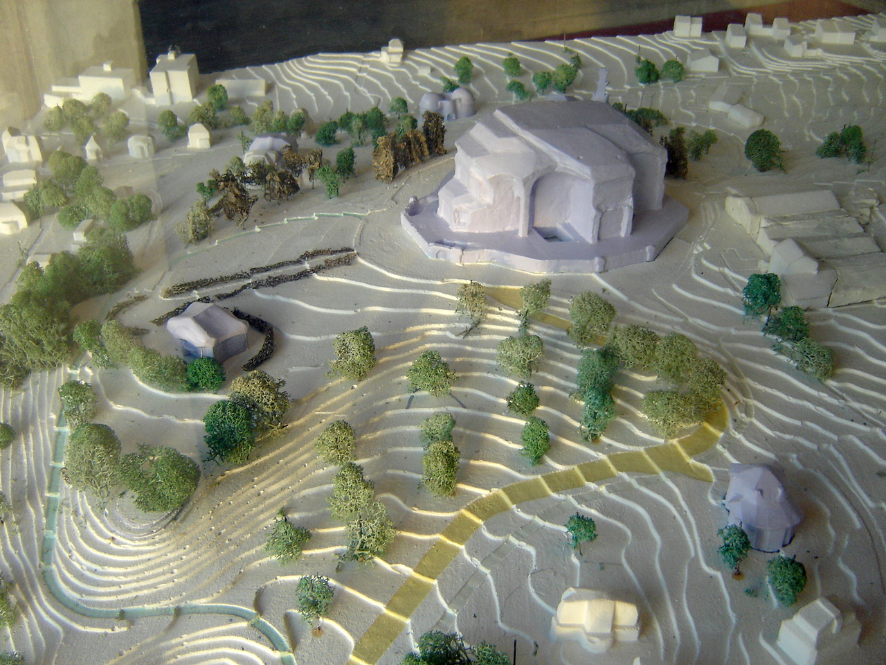 Goetheanum Model, Dornach, Schweiz